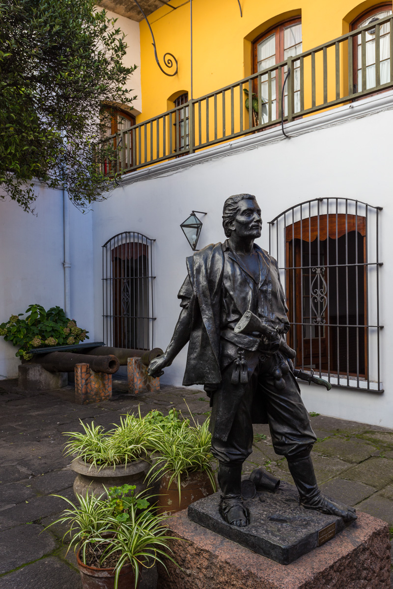 Casa del Brig. Gral. Juan Antonio Lavalleja - Museo Histórico Nacional. Ubicada en el departamento de Montevideo